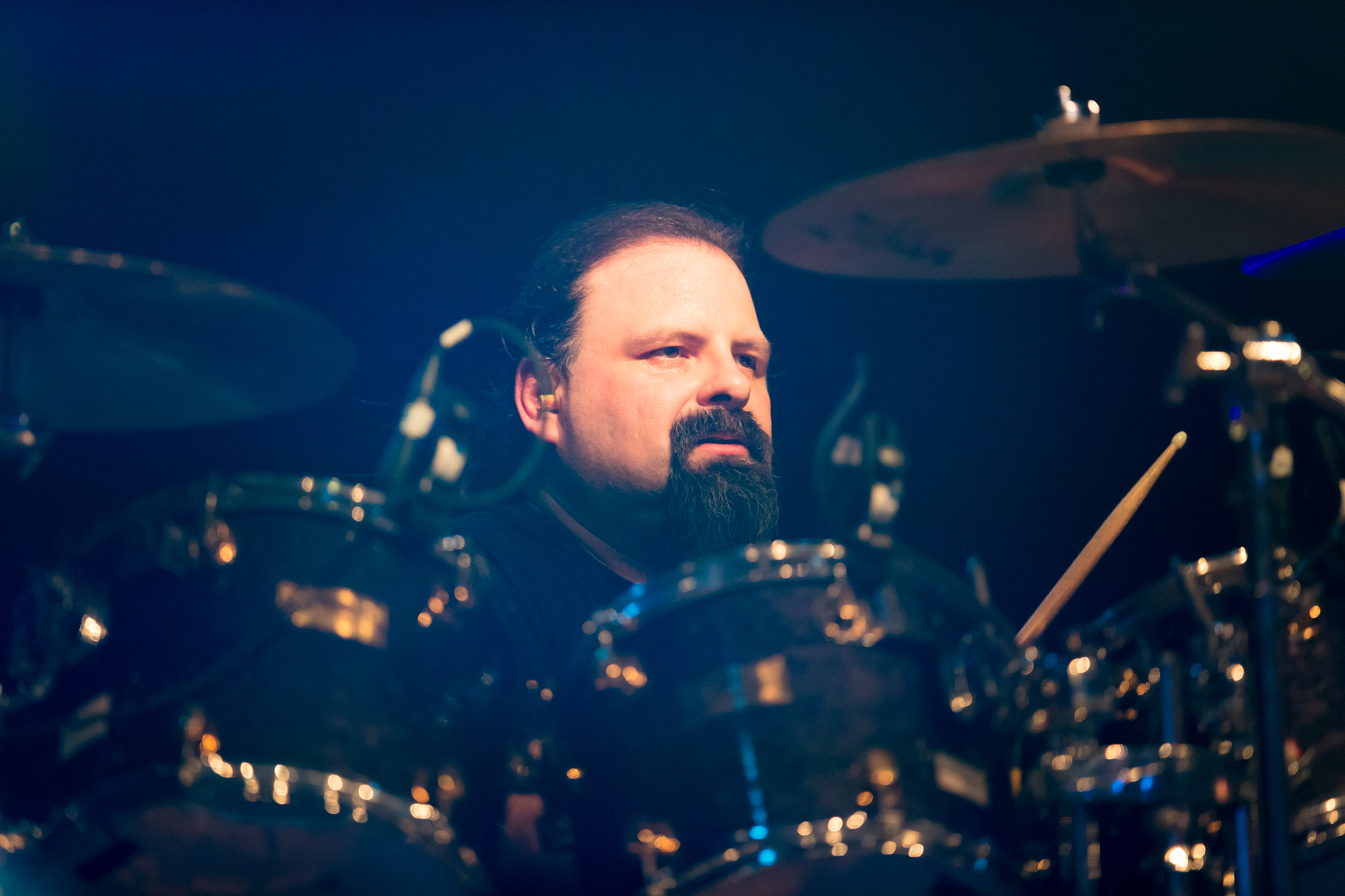 Napalm Death during Wacken Open Air at Schleswig-Holstein, Wacken, , Germany on 2017-08-03, Photo: Sven Mandel